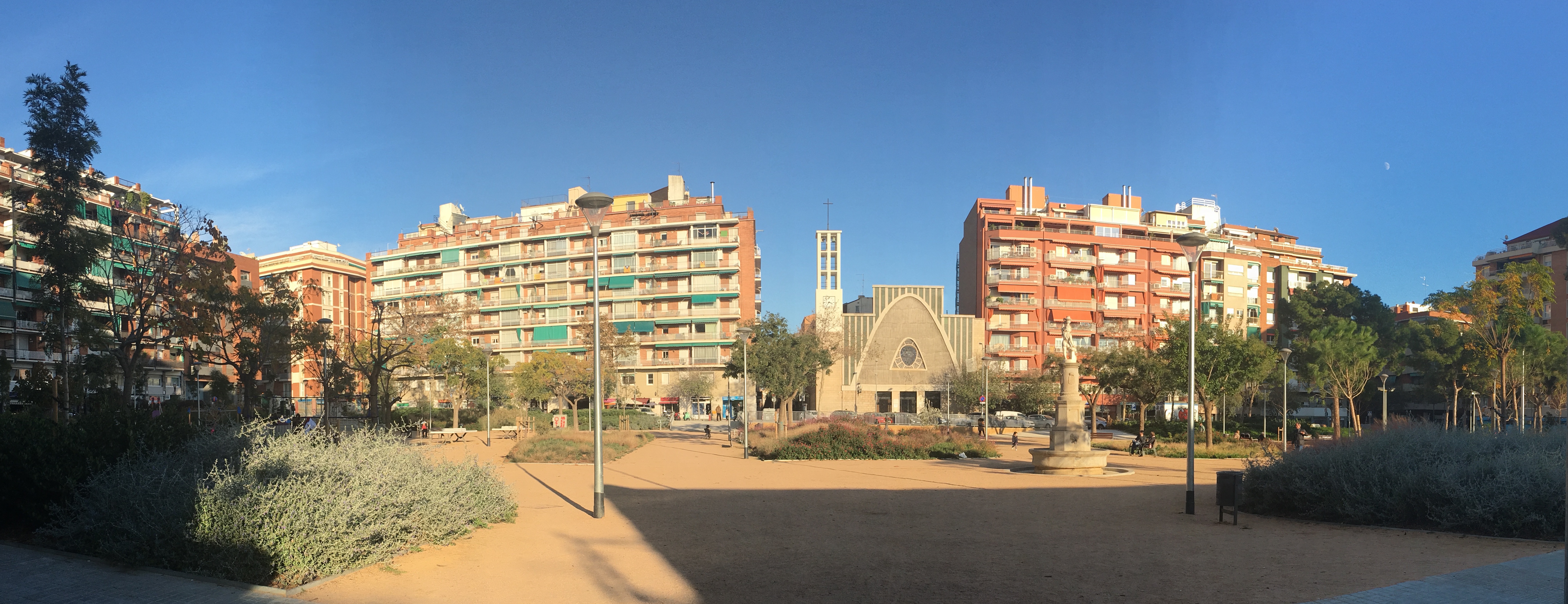 Panoràmica frontal dels Jardins de Can Mantega, al barri de Sants. Al fons, la parròquia de Sant Joan Maria Vianney (Barcelona, 2016).